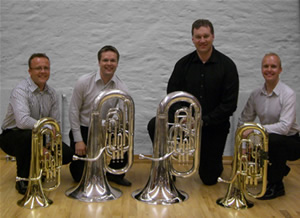 Bilde av Bergen Tuba Quartet